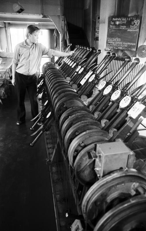 Zittau, Schmalspurbahn, Stellwerk ADN-Hiekel/ 25.5.90 Bez. Dresden: Vor einhundert Jahren, am 24.11.1890, ging nach 15monatiger Bauzeit die Schmalspurstrecke von Zittau zu den Kurorten Oybin und Jonsdorf in Betrieb. Am 26./27.5. treffen sich in Zittau Esenbahnfreunde aus Ost und West zur Geburtstagsfeier. Der Z.O.J.E. (nach den Anfangsbuchstaben der Städte), im Volksmund "Zug ohne jegliche Eile", sollte in diesem Jahr entsprechend der zentralen Berliner Planung einem Braunkohletagebau zum Opfer fallen. Er fuhr der Planwirtschaft davon und geht nun zuversichtlich in das zweite Jahrhundert seines Bestehens. Auch das Stellwerk gehört zu den technischen Sehenswürdigkeiten.